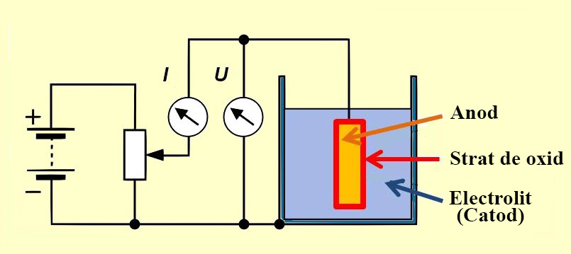 Principiul oxidarii anodice